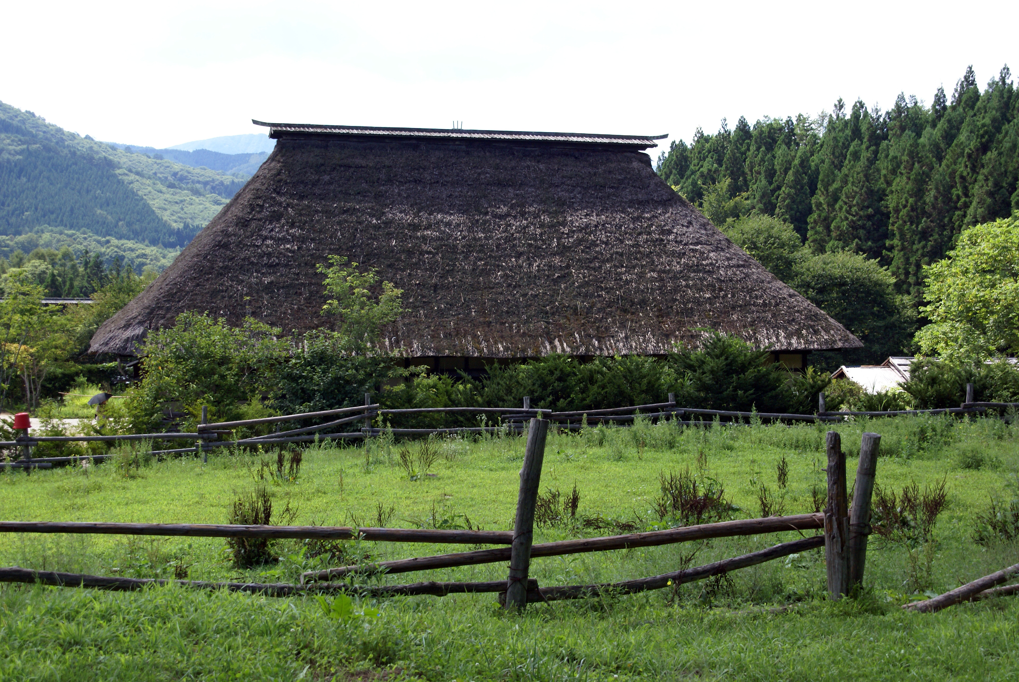 Tono Furusato-mura in Tono, Iwate prefecture, Japan